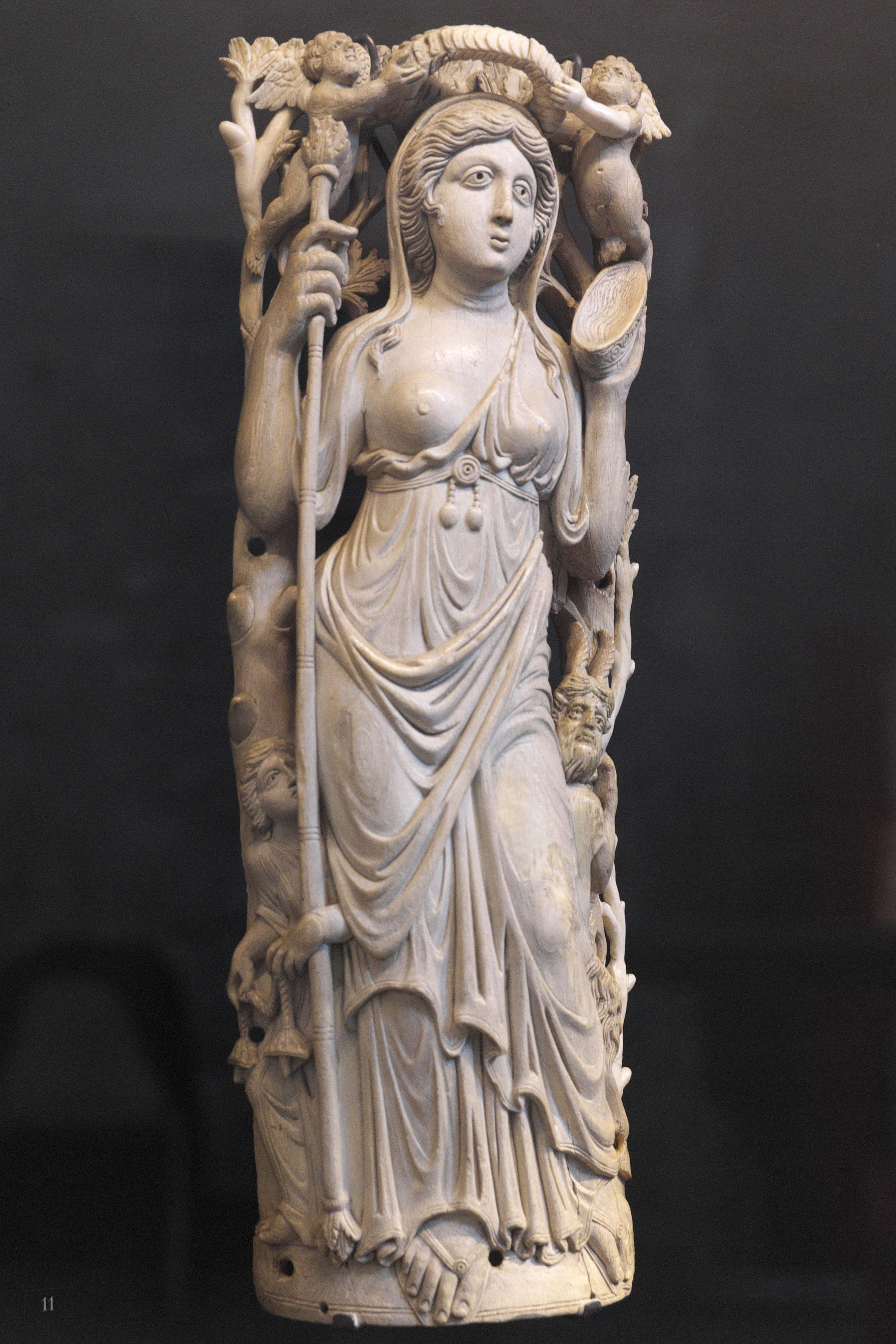 Musée national du Moyen Âge (Musée de Cluny) im 5. Arrondissement in Paris, Ausstellung: Les Temps mérovingiens; Ariadne, Elfenbeinrelief aus dem 6. Jahrhundert